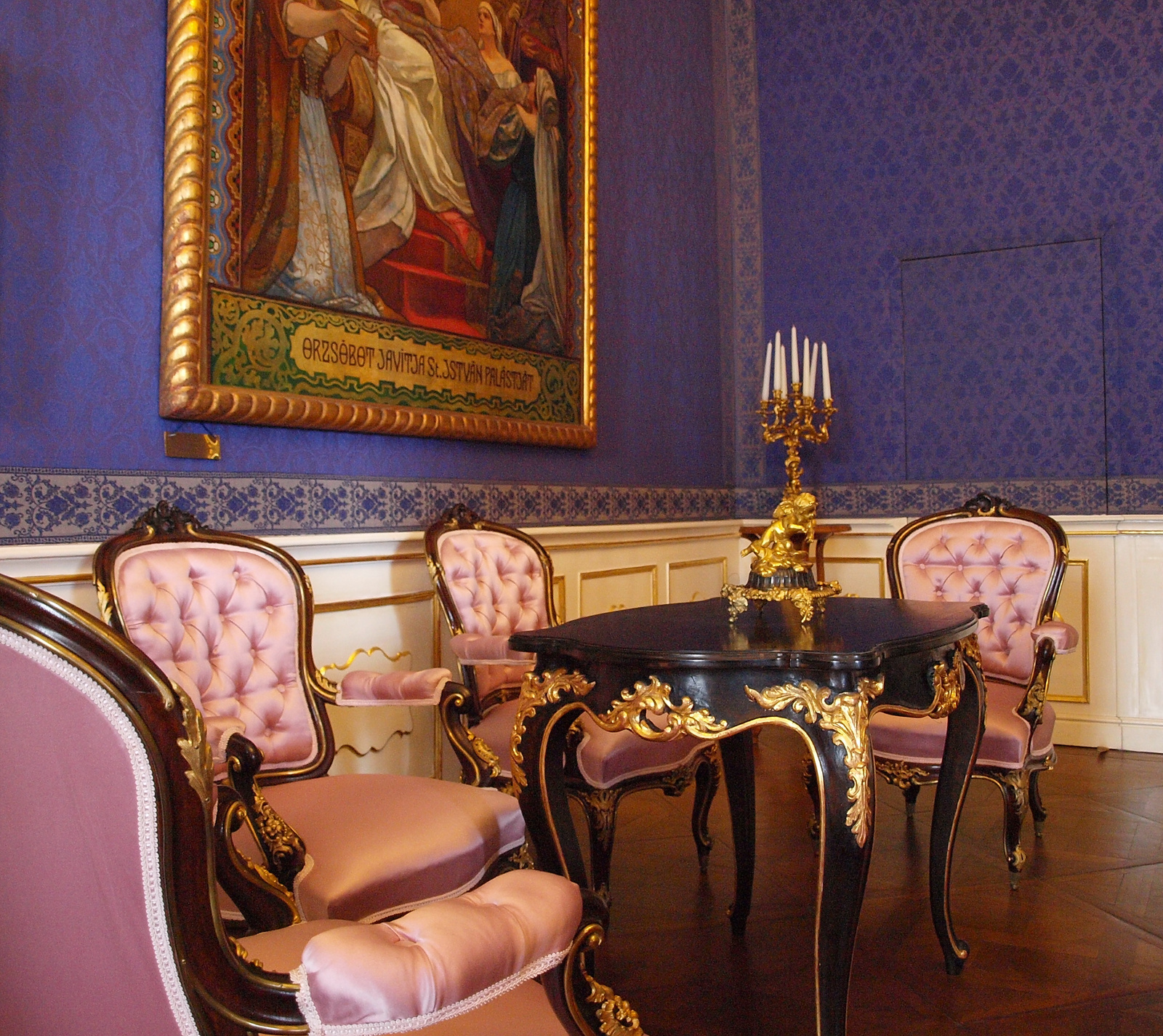 Grassalkovich-kastély (Gödöllő, Martinovics utca 16.) This is a photo of a monument in Hungary. Identifier: 7051